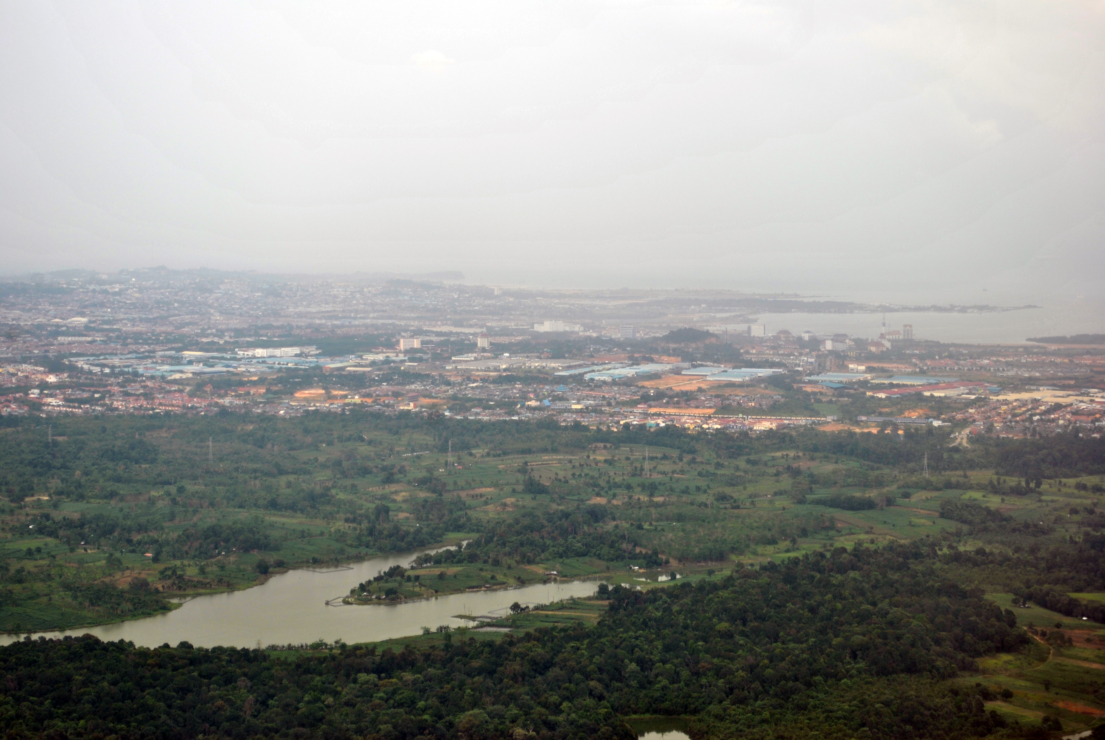 Batam Centre